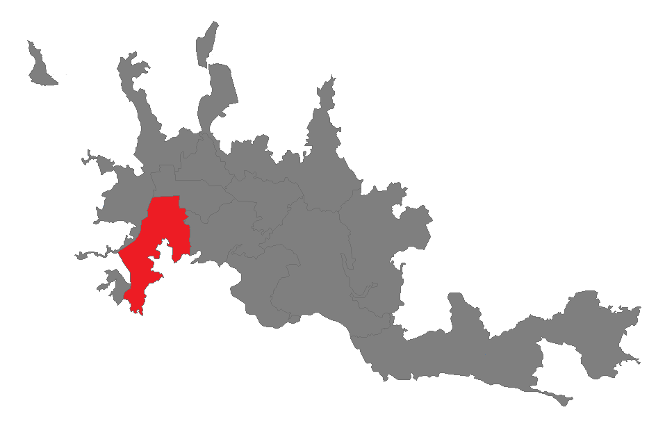 mapa de la comuna la macarena de manizales